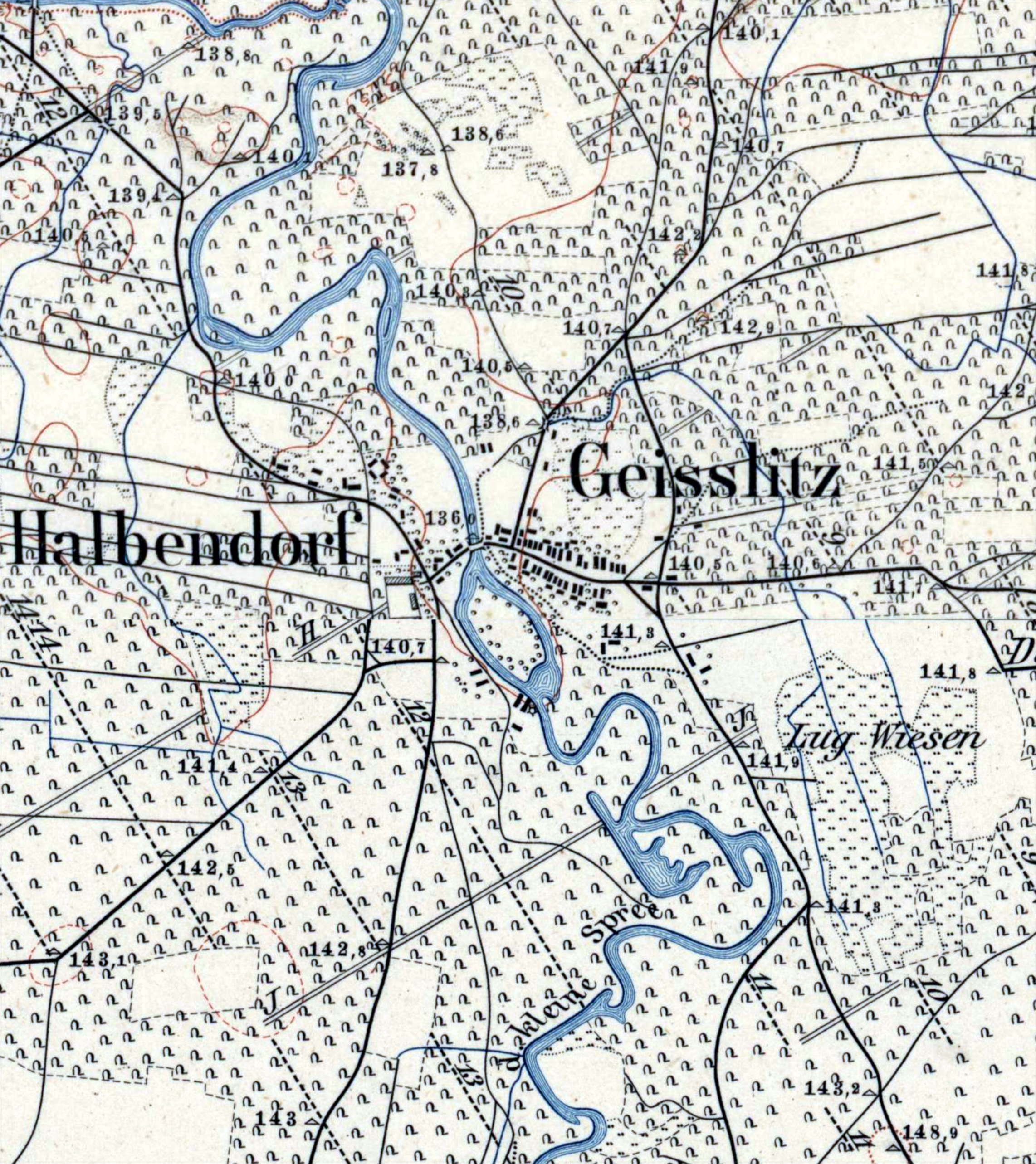 Halbendorf und Geißlitz auf der Äquidistantenkarte von 1884. Hornjoserbsce: Połpica a Kislica na hamtskej karće z lěta 1884.